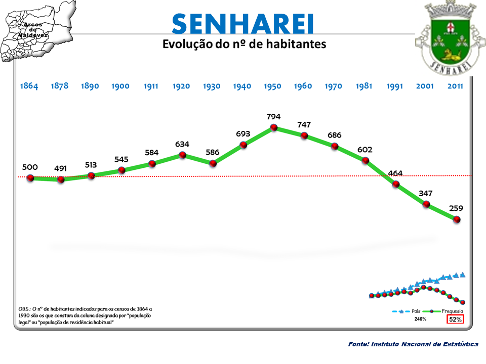 Censos 1864/2011